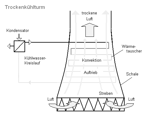 Trockenkühlturm